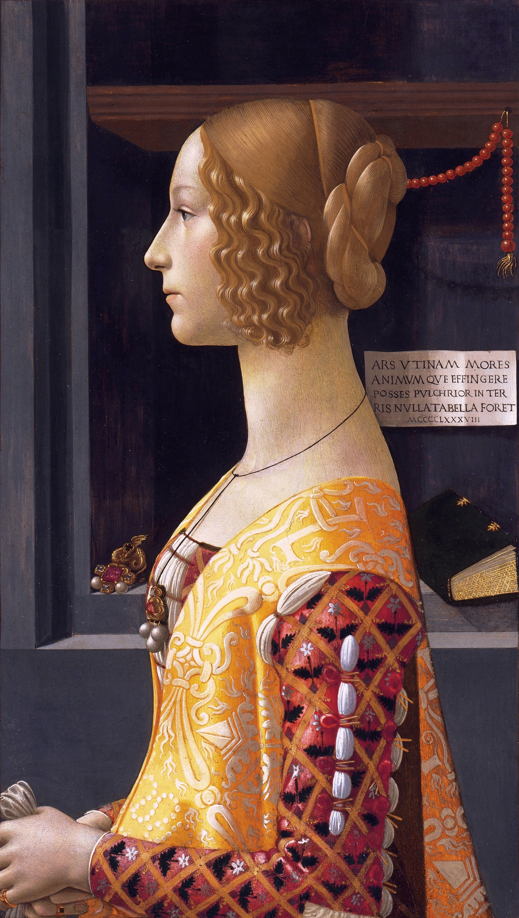 Depicted person: Giovanna Tornabuoni